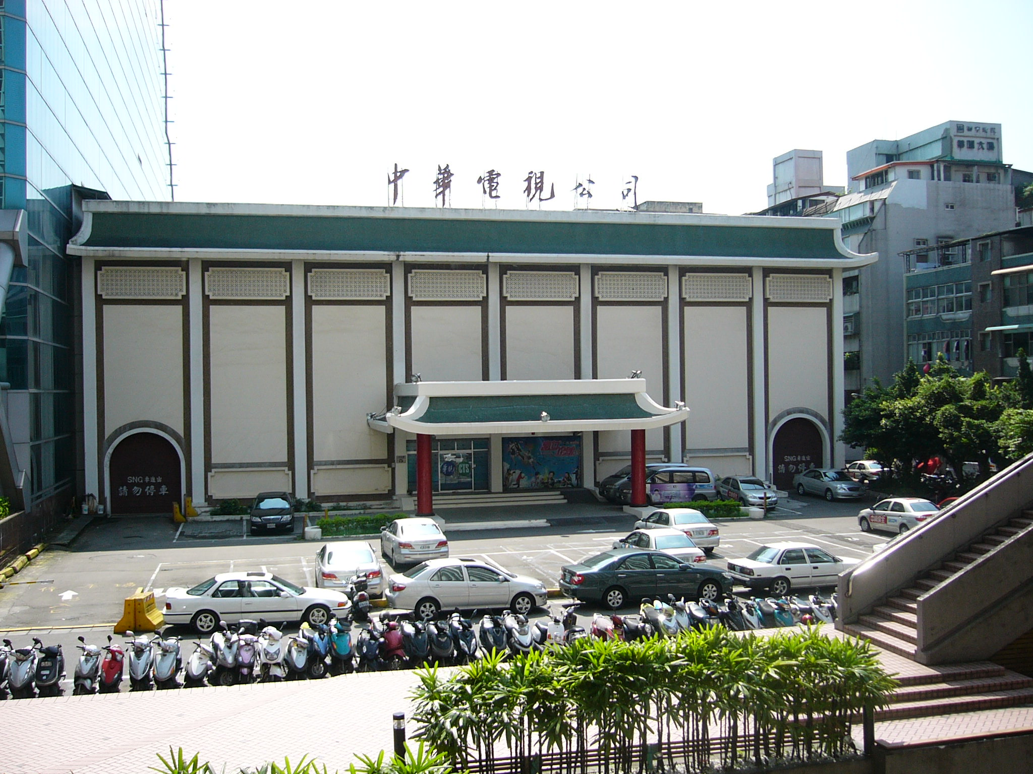 中華電視公司攝影大樓正面外觀。